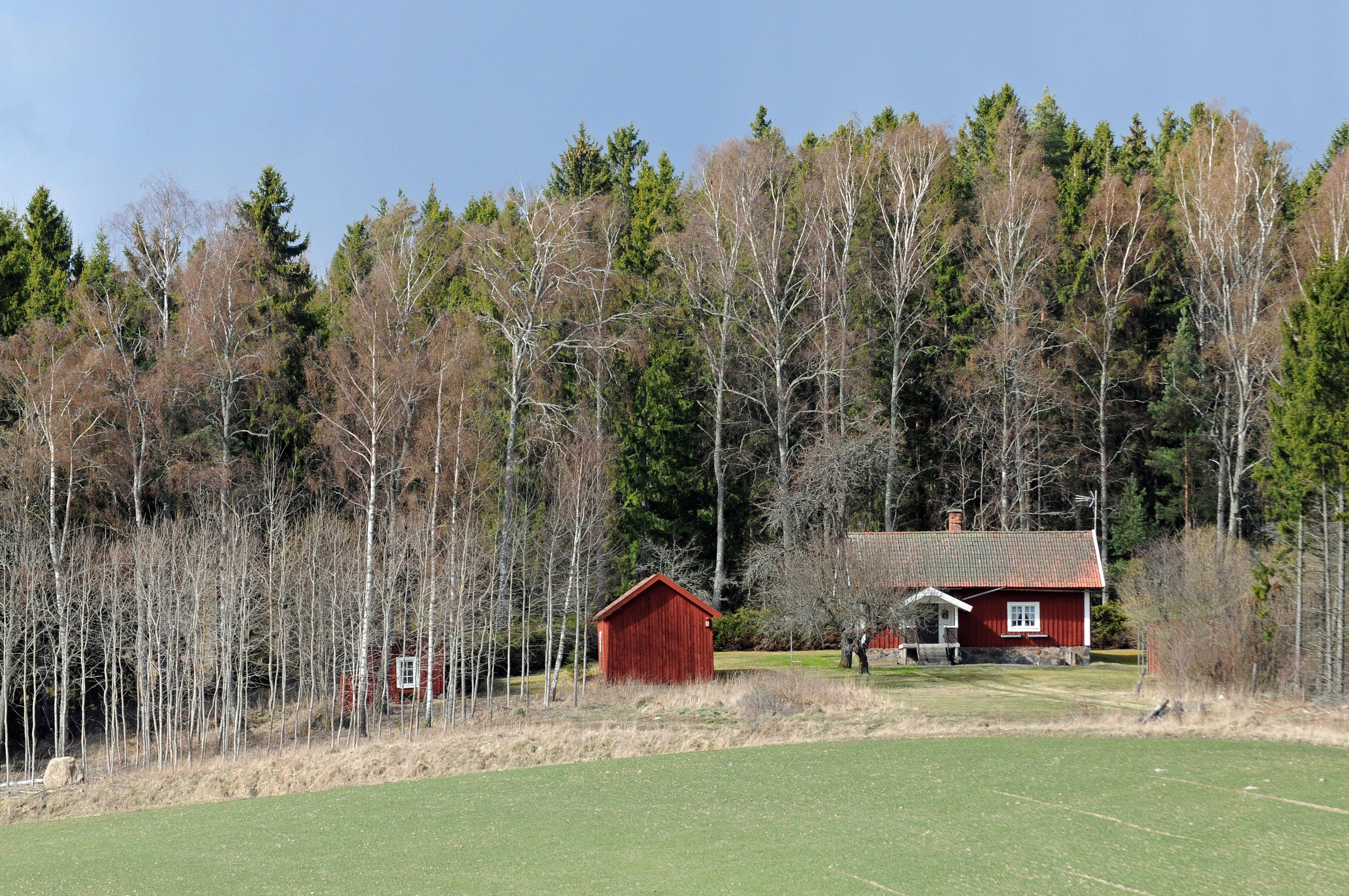 Lötstugan i Bärbo socken, Nyköpings kommun